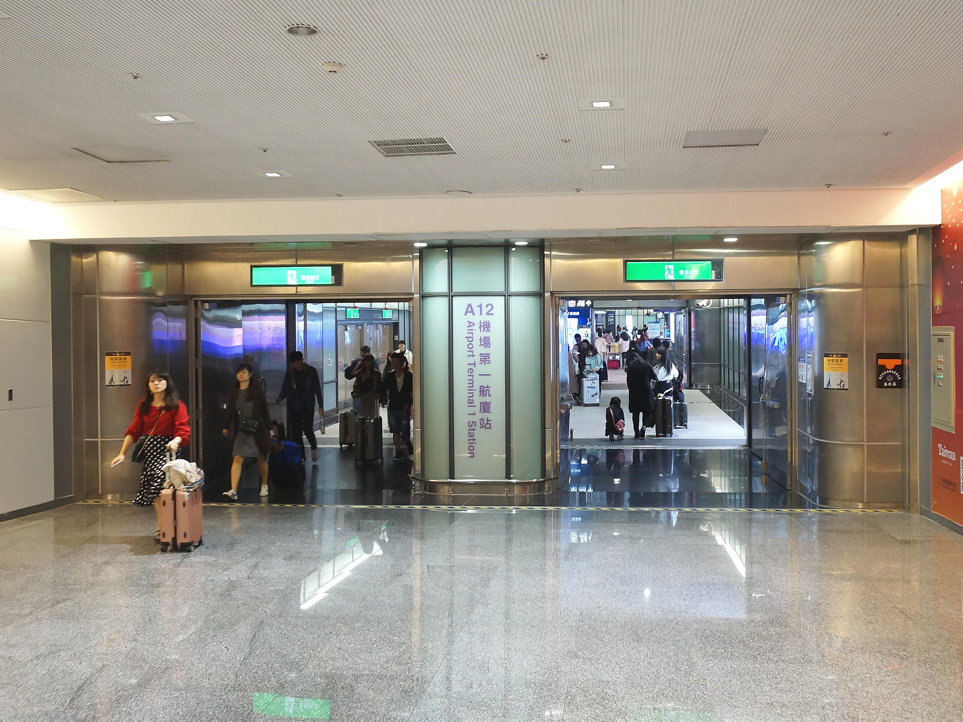 桃園國際機場捷運機場第一航廈站機場連通道外側，通往本站大廳層。